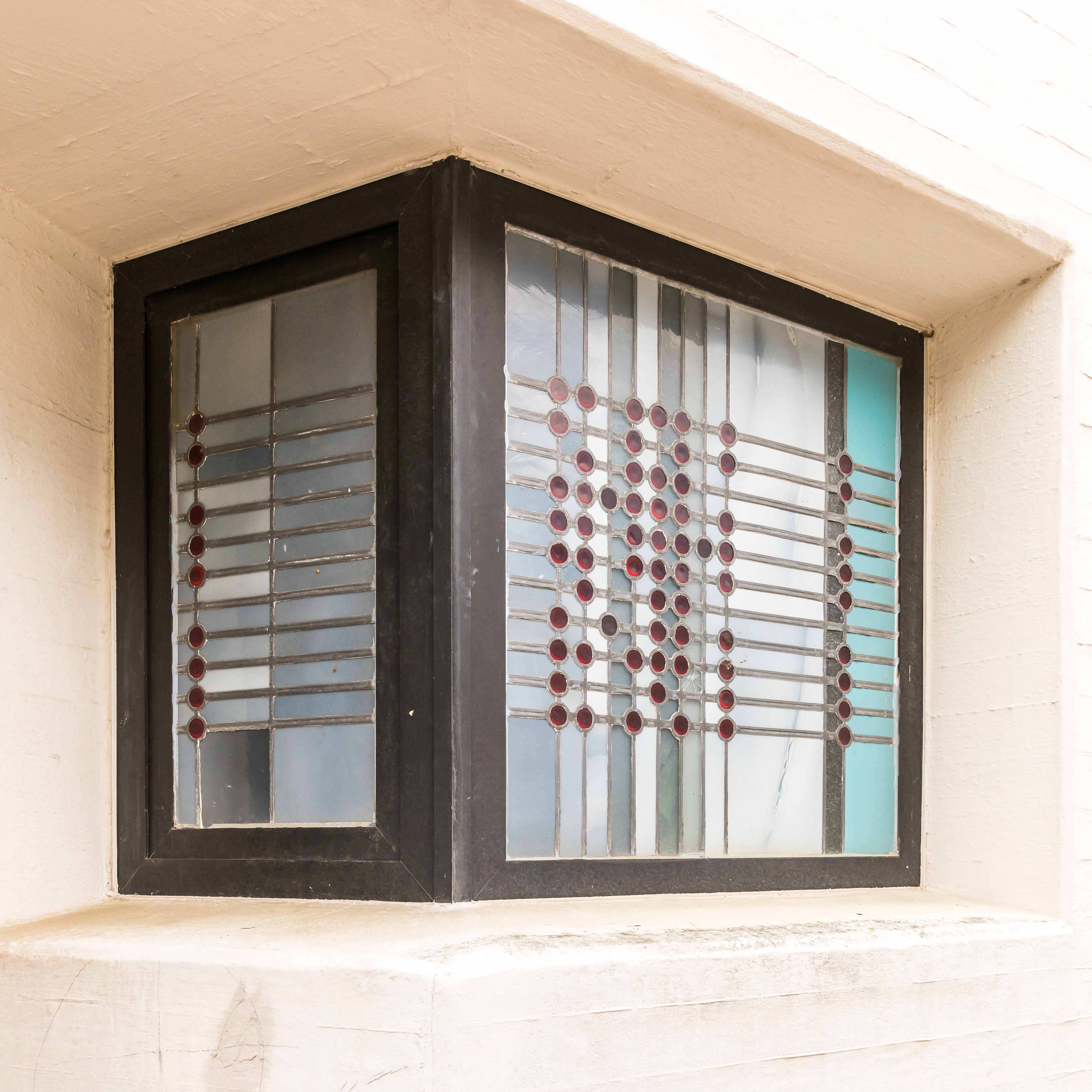 Christi Geburt, Wilhelm-Köln-Löhers-Platz 2, Bocklemünd/Mengenich. . Detail: Fenster